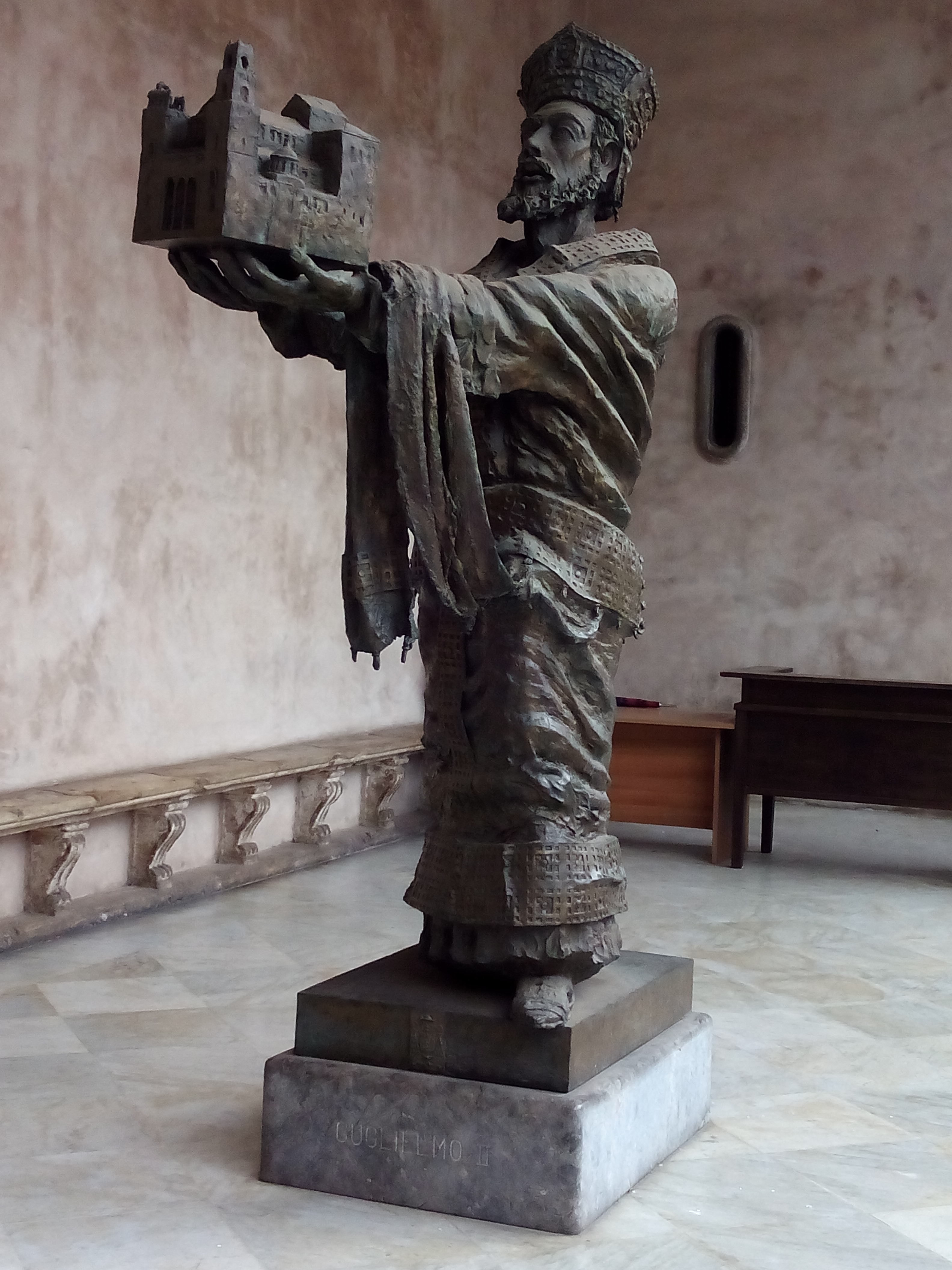 Gilen II.a Onbera